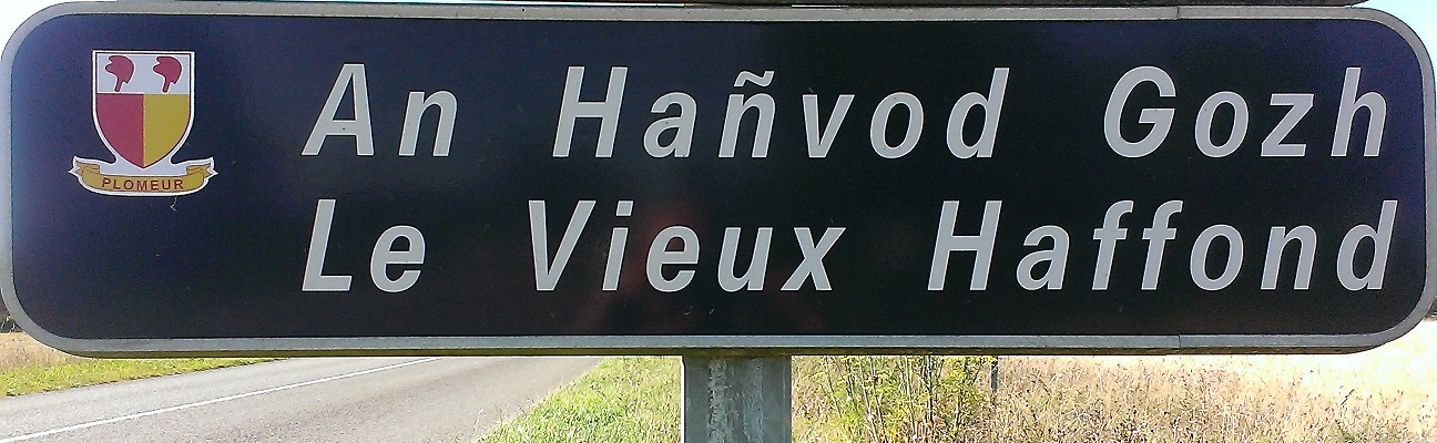 Panell enkerzh en Hañvod, kumun Ploveur, Penn-ar-Bed.